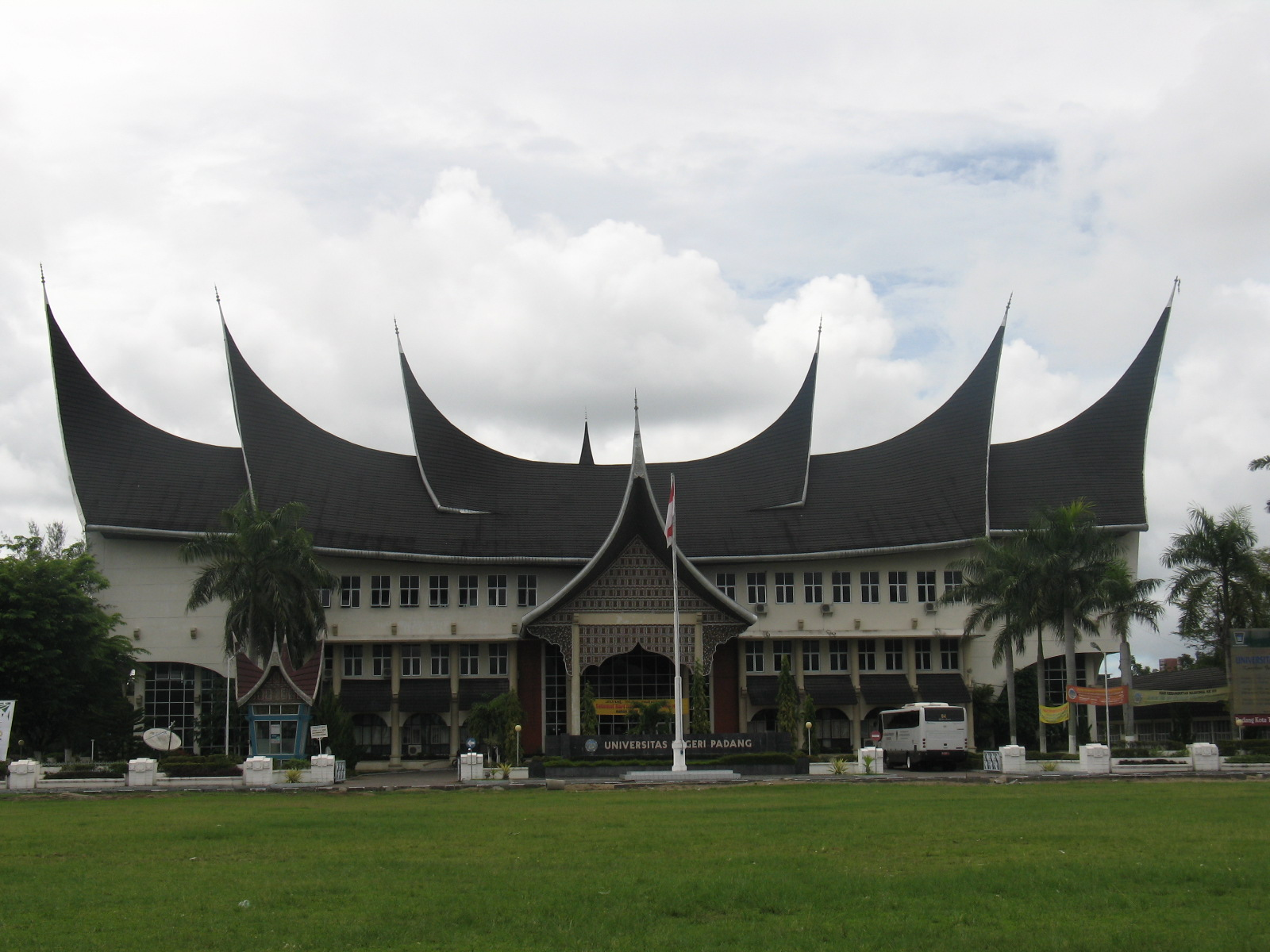 Gedung Rektorat UNP di Air Tawar